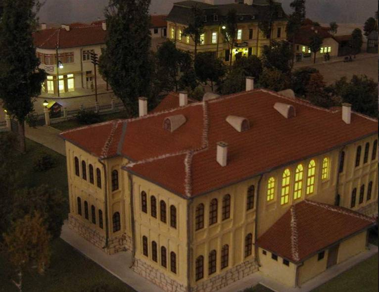 Сграда в Разград от времето на Османската Империя